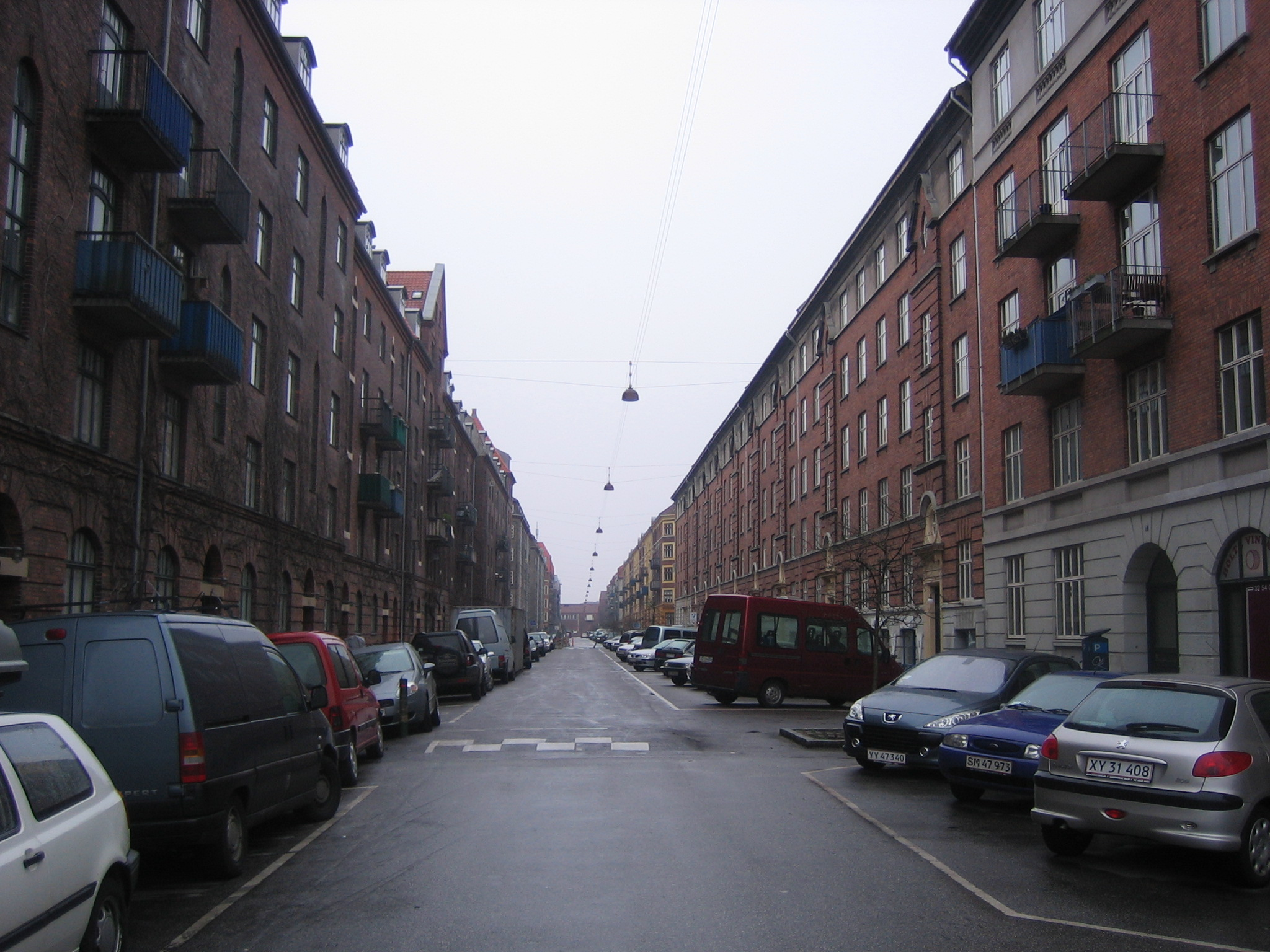 Egilsgade, Islands Brygge, København